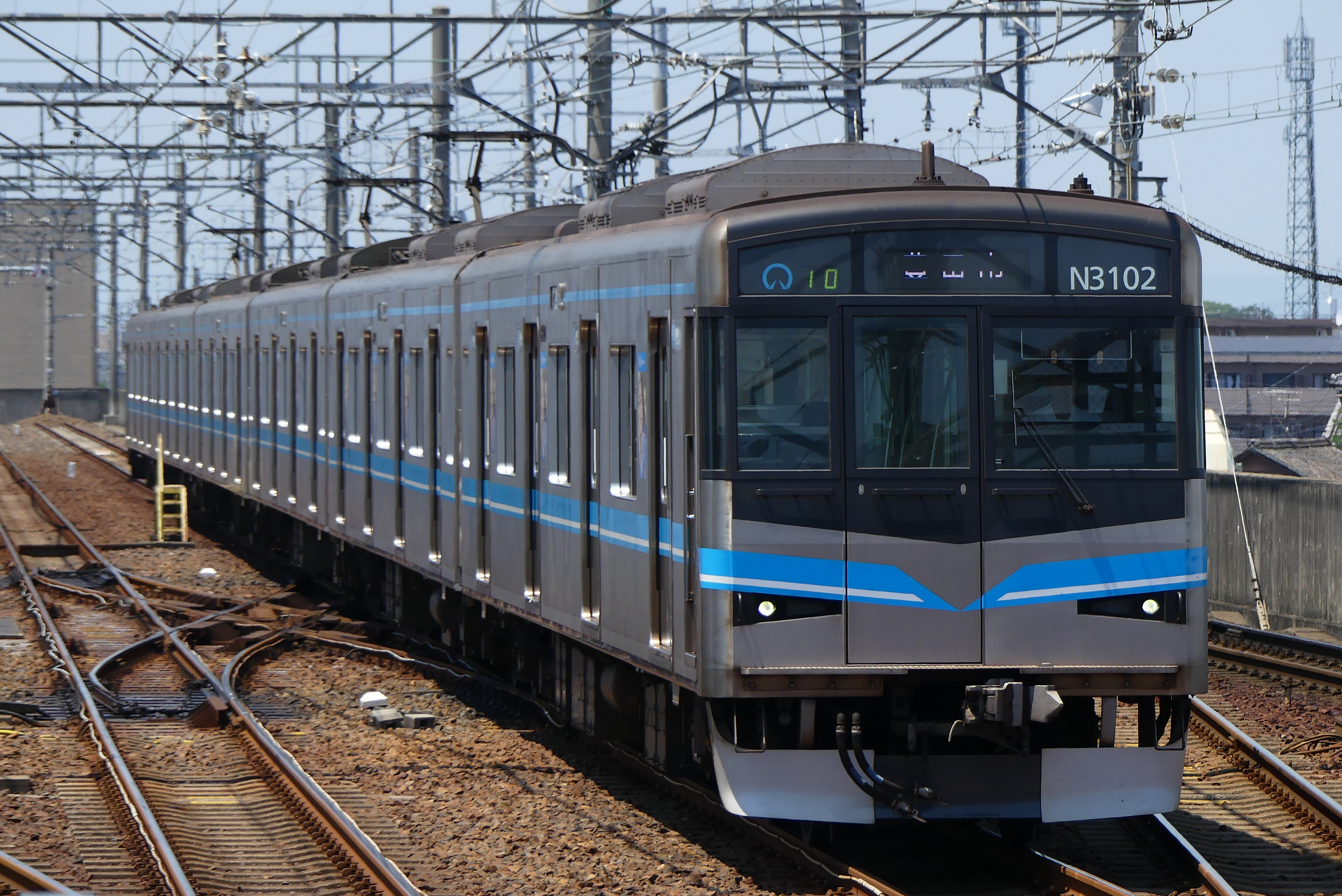 N3000形第2編成